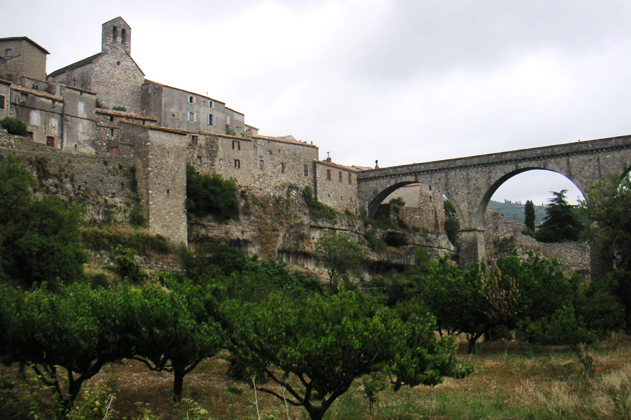 Le pont rejoignant Minerve à la route départementale.